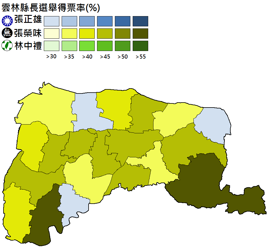 1999年雲林縣長選舉